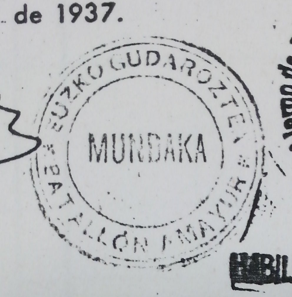 Euzko Gudarosteko Amayur Batailoiko zigilua. Irudia Sabino Arana Fundazioko artxiboan gordetzen diren nominetan agertzen da. Nominen originalak Salamancako paperetan gordetzen dira.